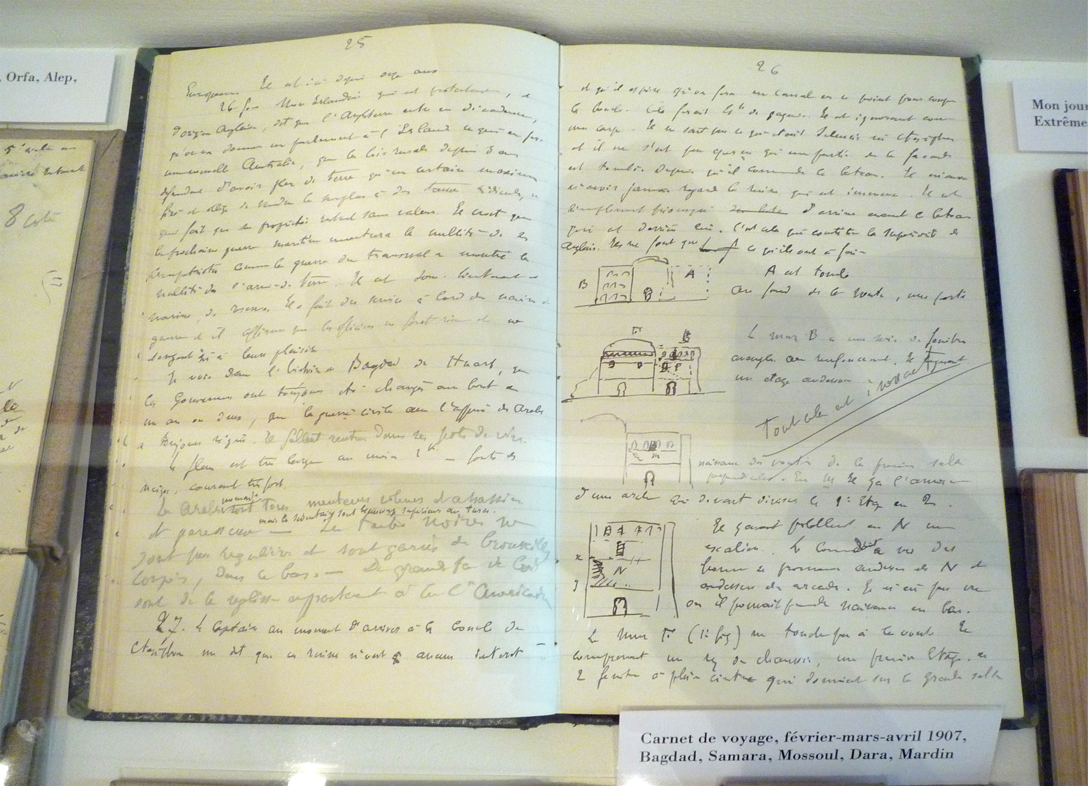 Carnet de voyage du général Léon de Beylié en 1907 en Irak. (Musée de Grenoble)